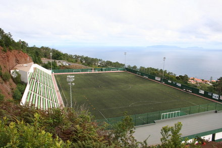 Campo do Sporting Clube Santacruzense